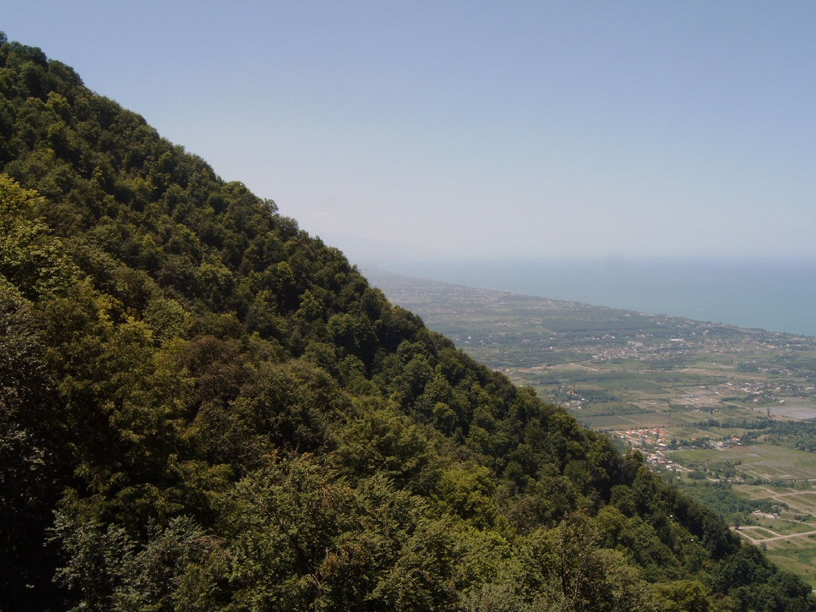 Kaspisches Meer im Iran, Namakabrood Autor:Mr.minoque Mai 2006